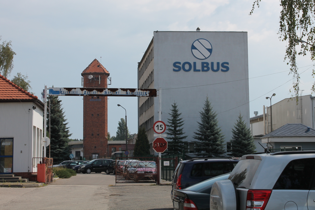 Budynek Fabryki Autobusów Solbus. This photo was taken during Railway Wikiexpedition 2014 set up by Wikimedia Polska Association in cooperation with Fundacja Grupy PKP. You can see all photographs in category Wikiekspedycja kolejowa 2014.